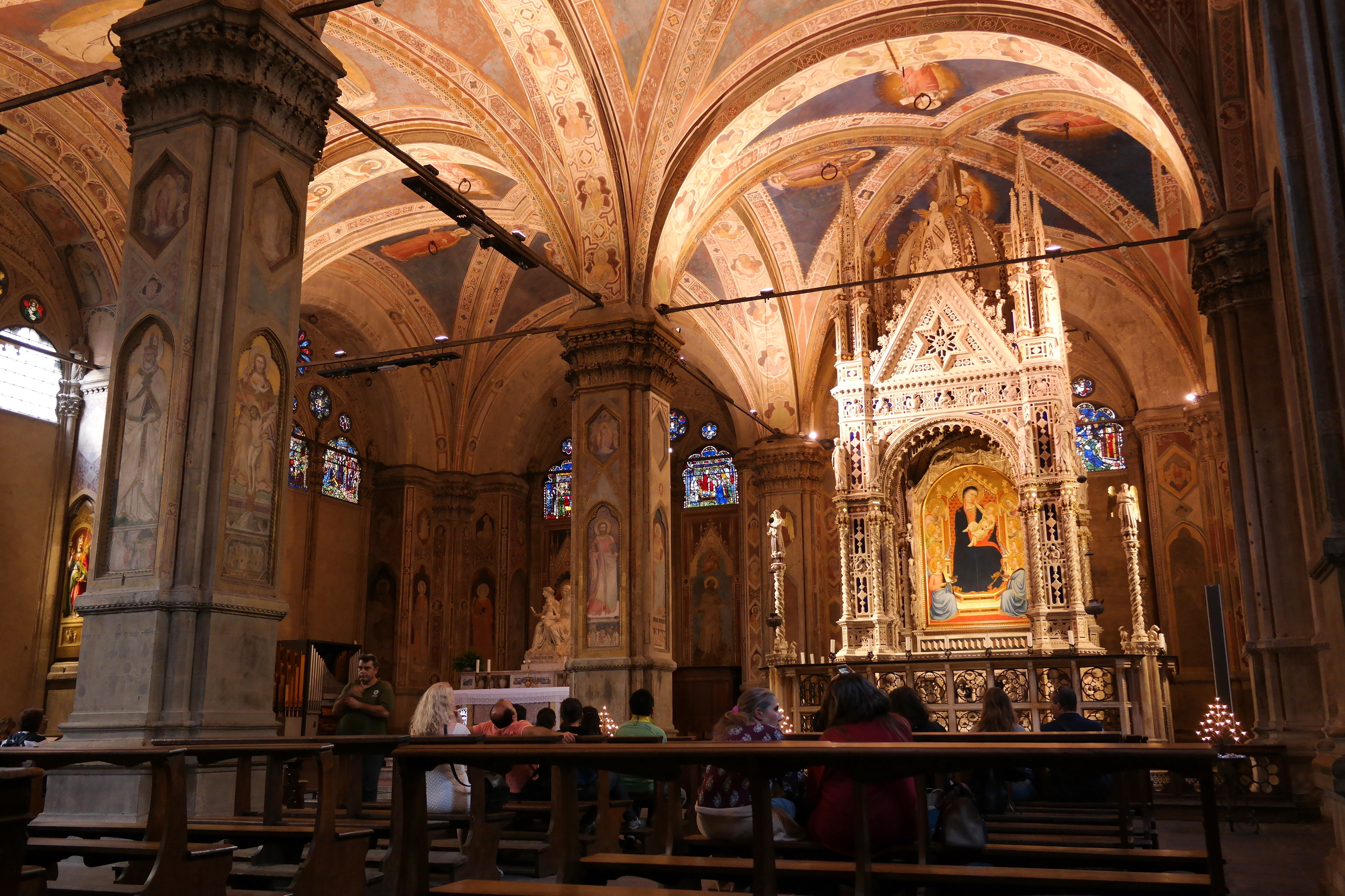 Interno della Chiesa di Orsammichele a Firenze